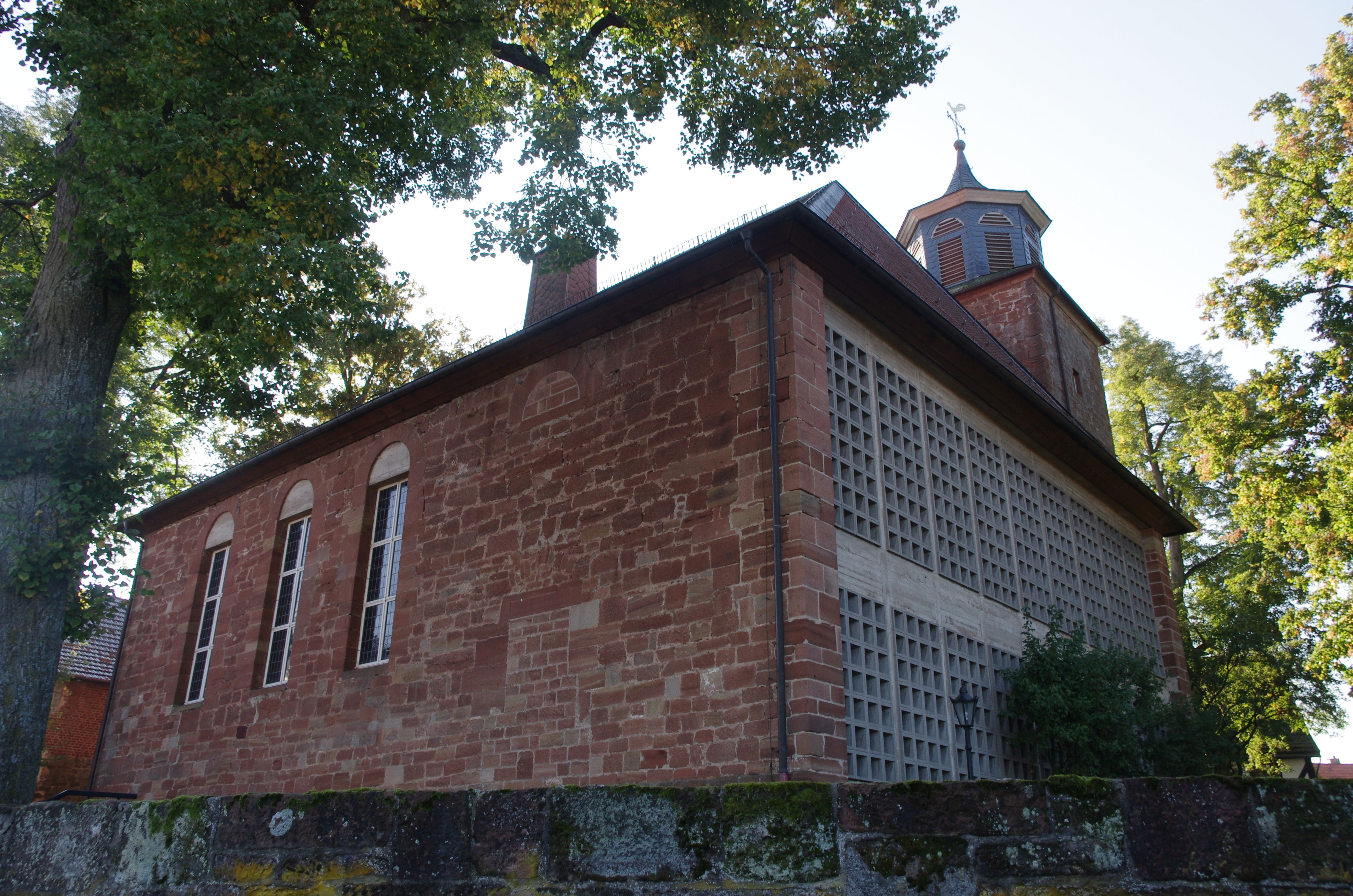 Frankenberg Ortsteil Geismar in Hessen. Die Kirche des Ortes.